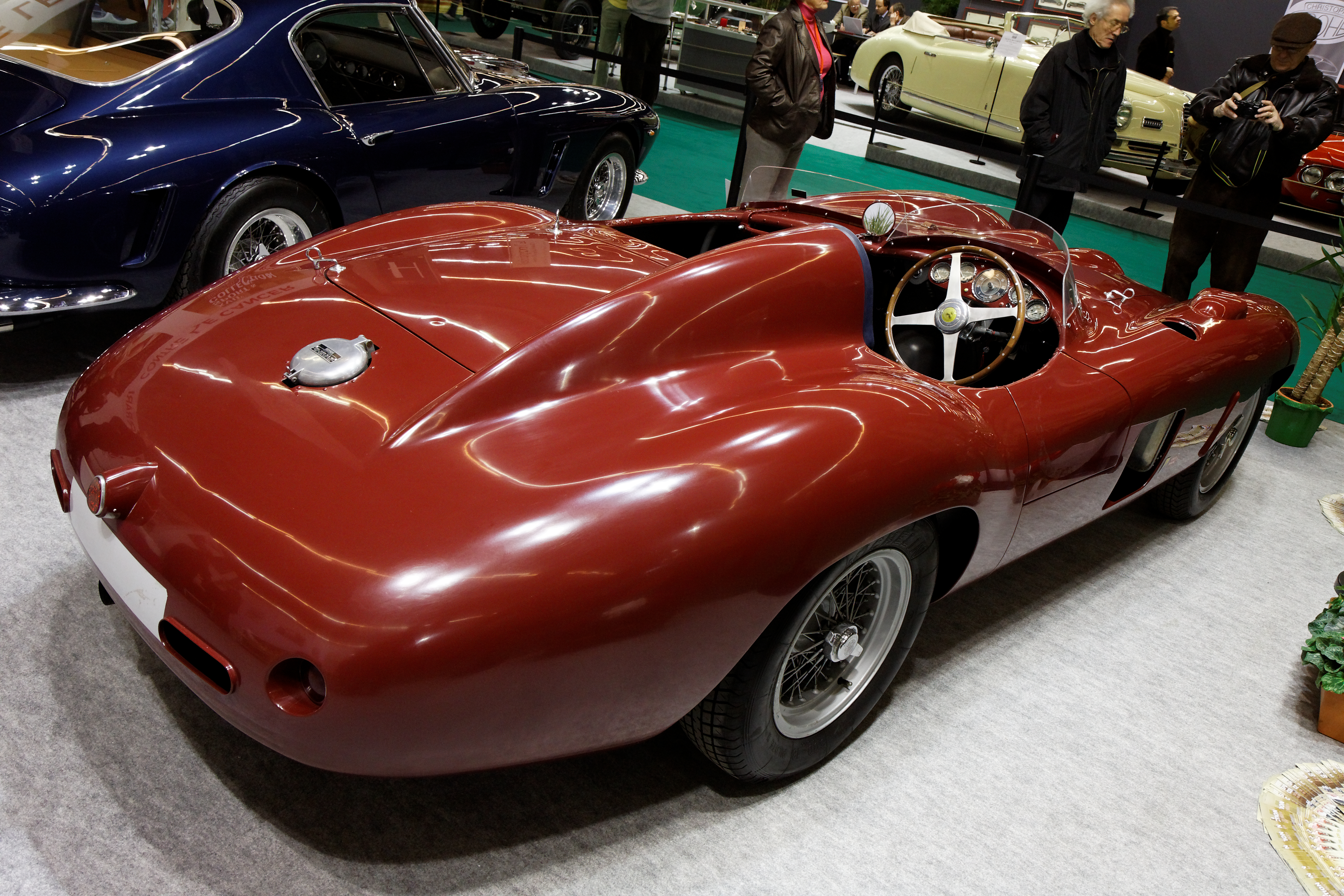 Photographie prise lors du salon rétromobile 2011 à Paris, porte de Versailles.